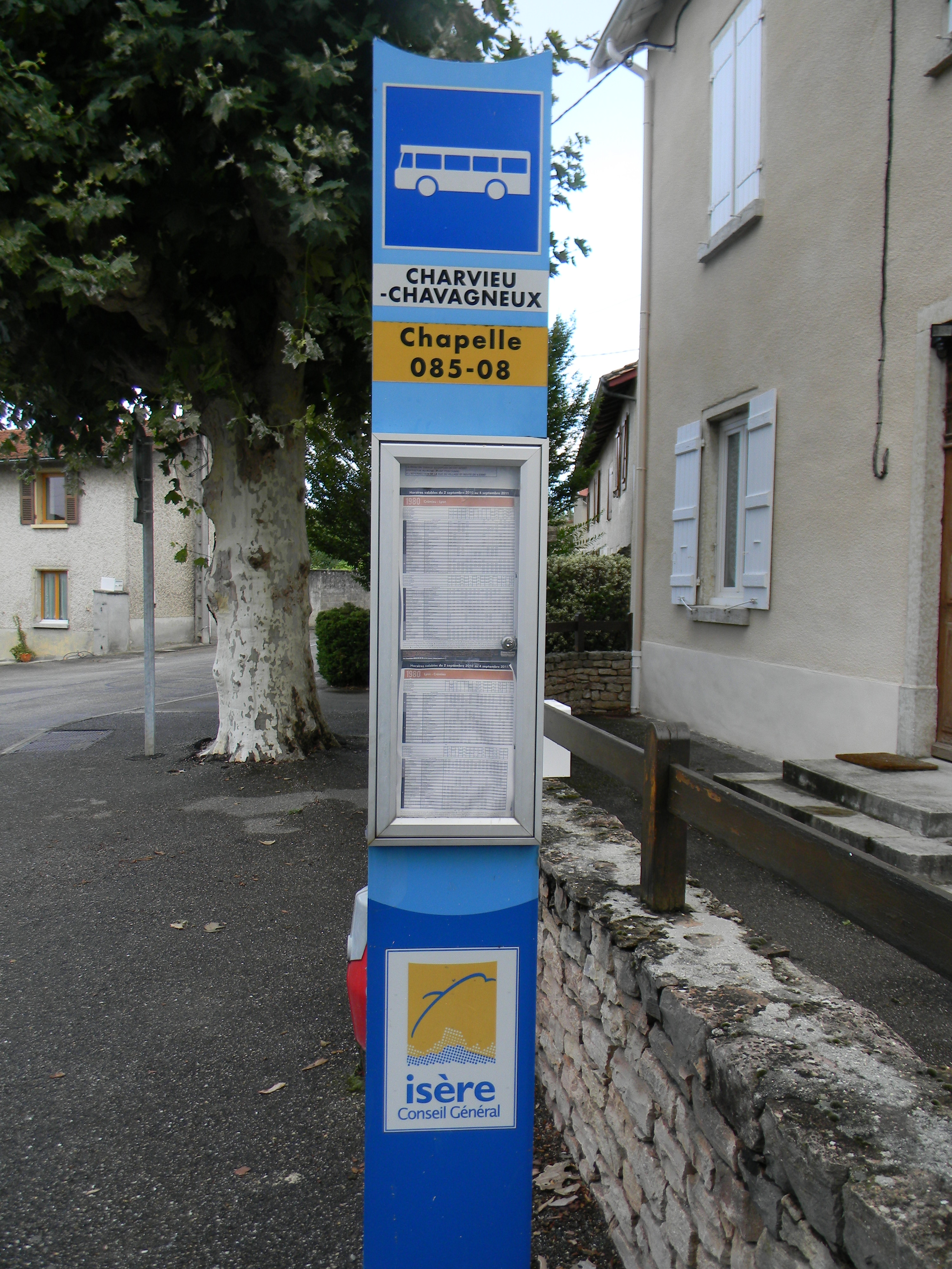 Arrêt de car VFD à la chapelle de Charvieu-Chavagneux.